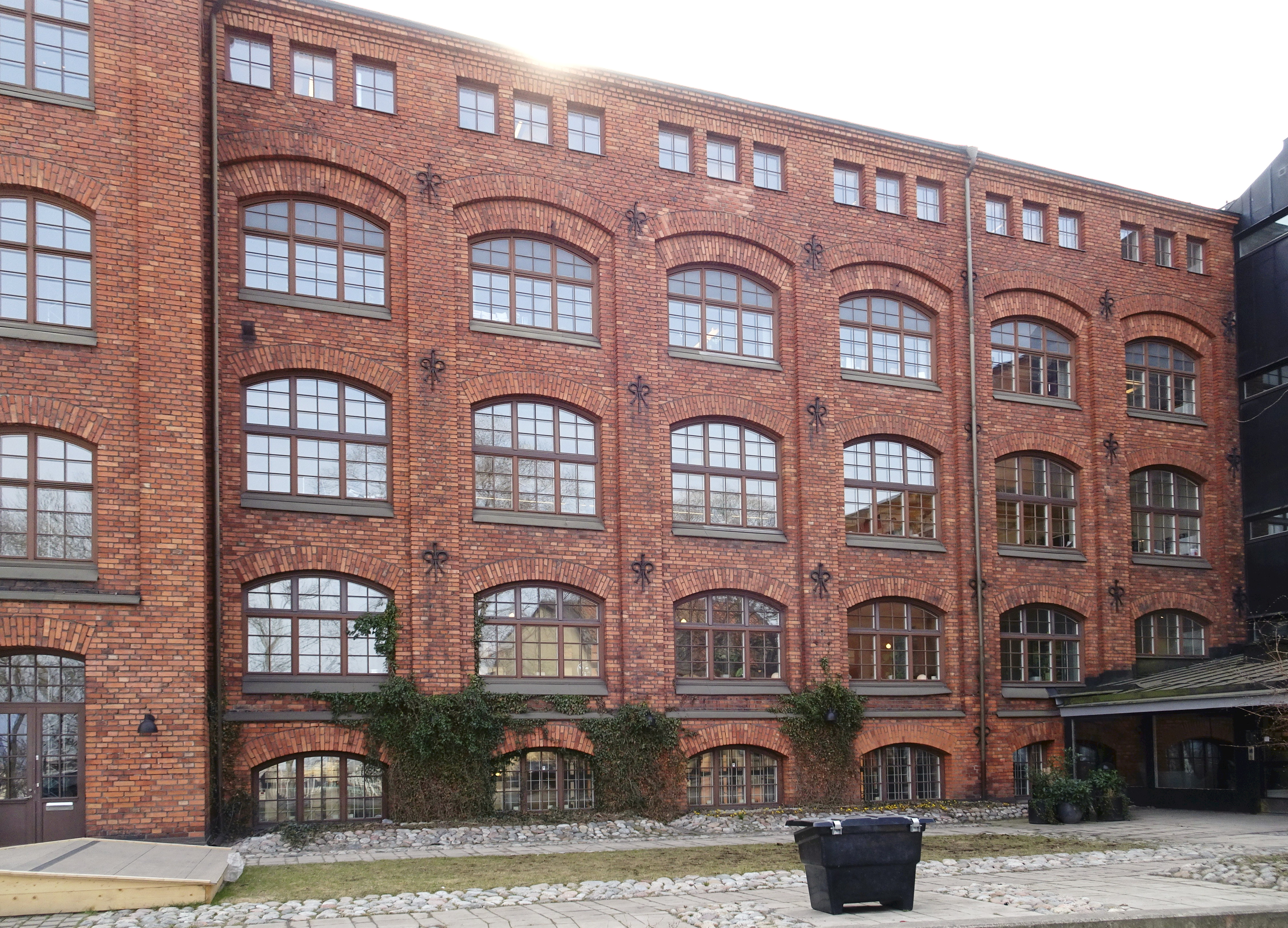 Fastigheten Fiskaren mindre 14, byggd 1896 och 1903, arkitekt Isak Gustaf Clason